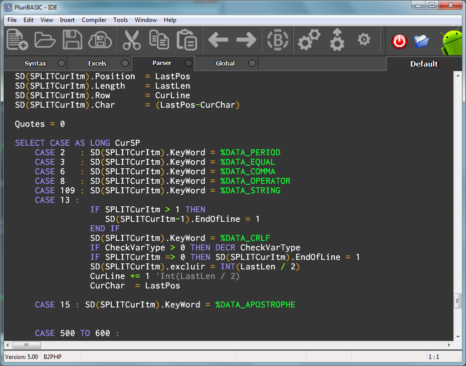 La sintaxis del BASIC utilizado es muy similar a PowerBASIC.